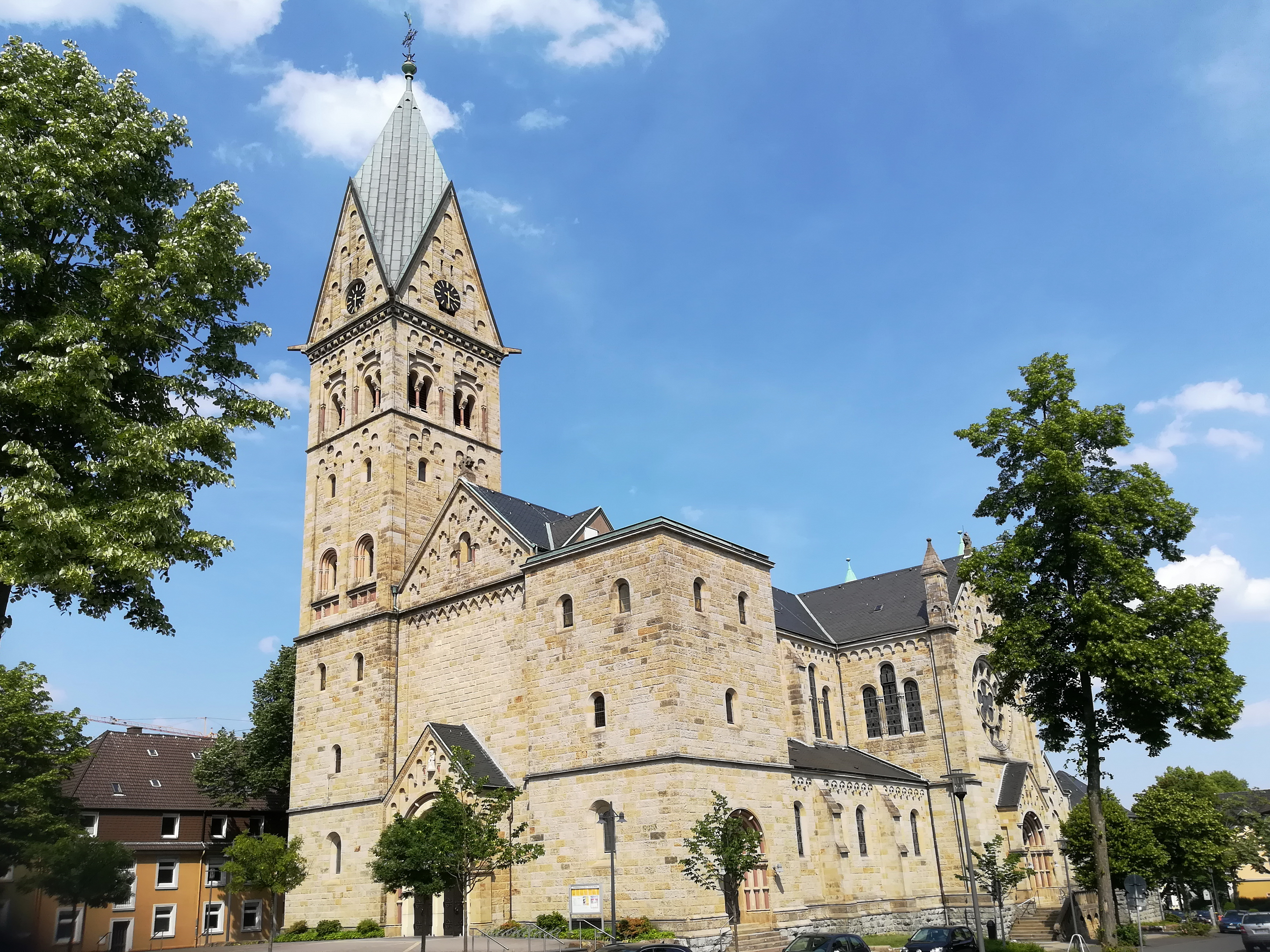 Pfarrkirche St. Paulus aus dem Jahre 1906